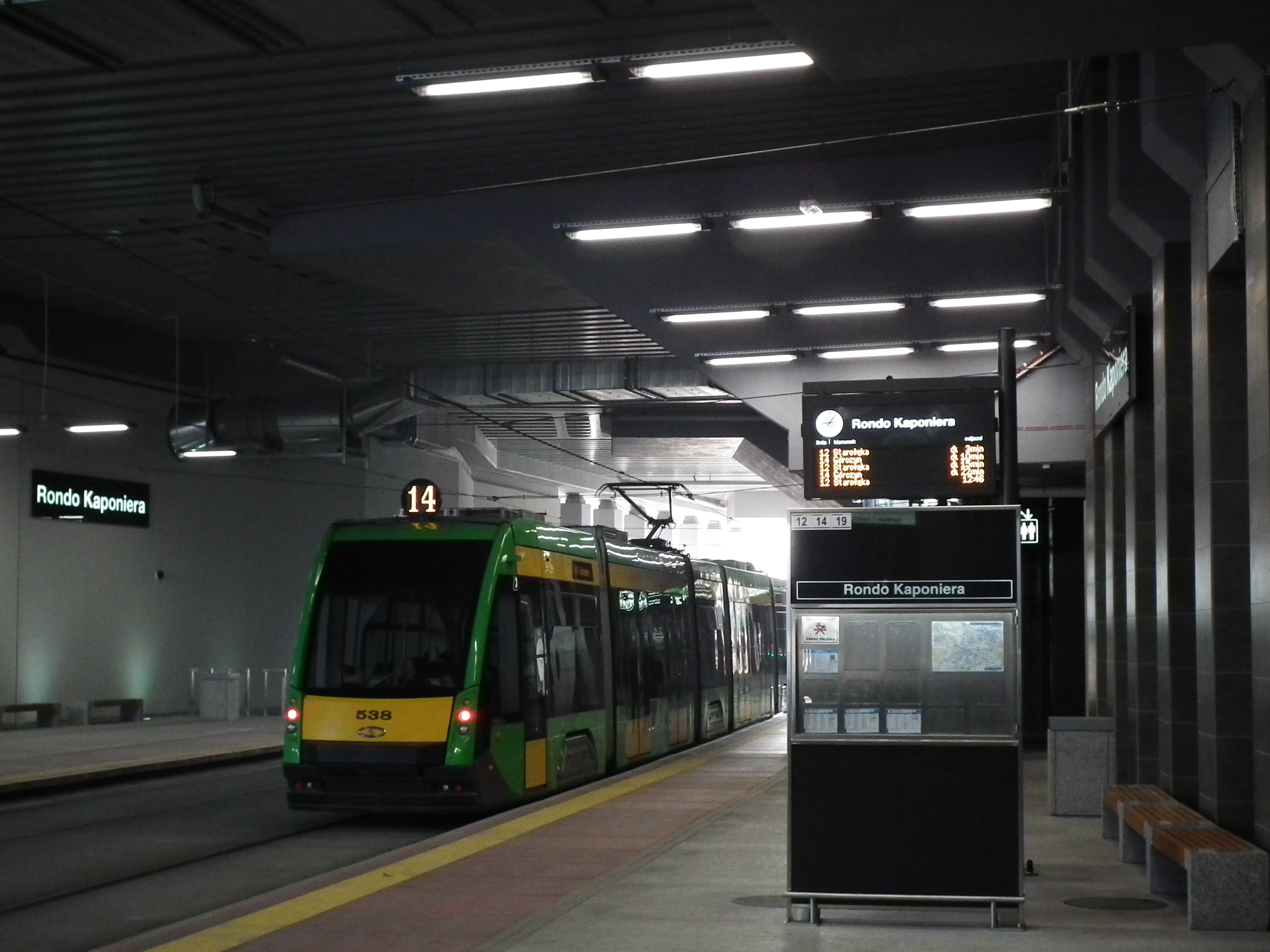 Stacja PST Rondo Kaponiera (dolna) w Poznaniu.